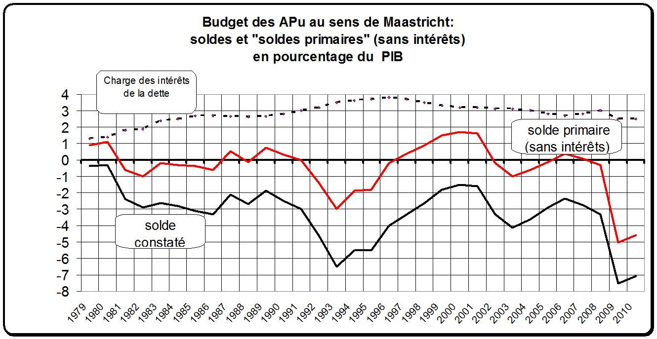 Solde France des budgets primaires et constatés en pourcentage du PIB